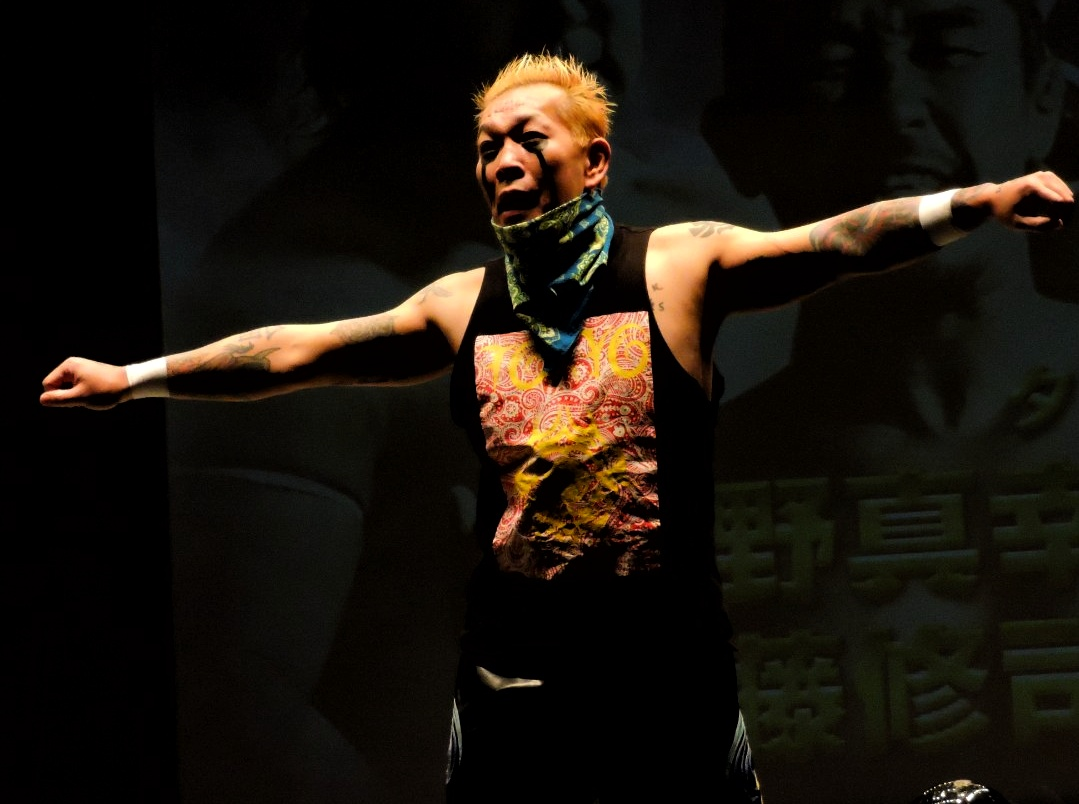 プロレスラーのNOSAWA論外